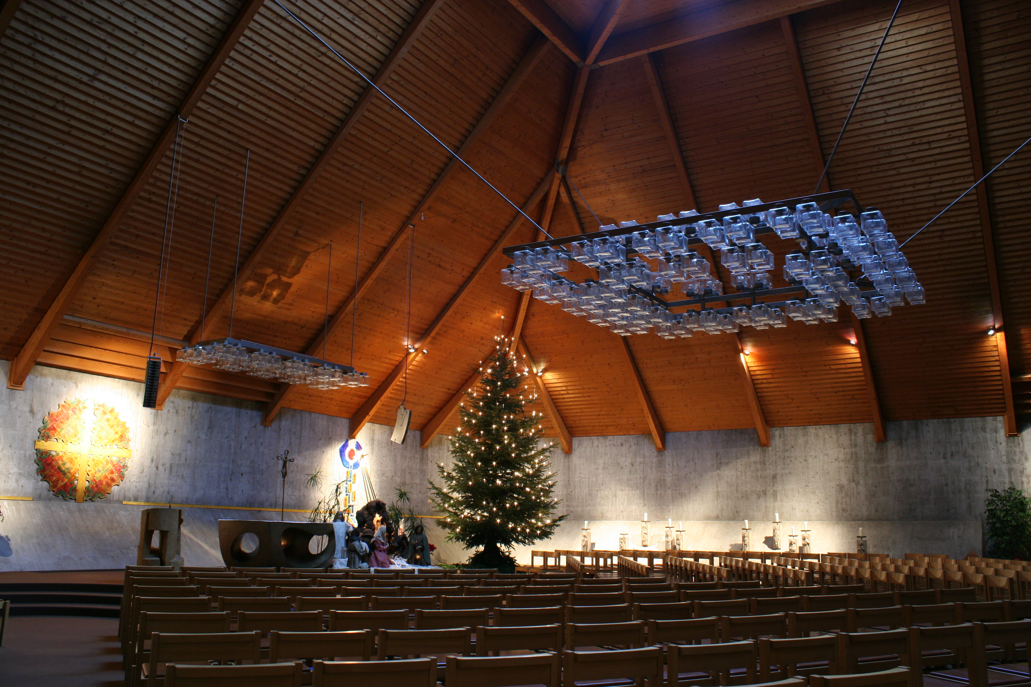 Römisch-katholische Pfarrkirche Heilig Kreuz (Zürich-Altstetten), Innenaufnahme Weihnachten 2013